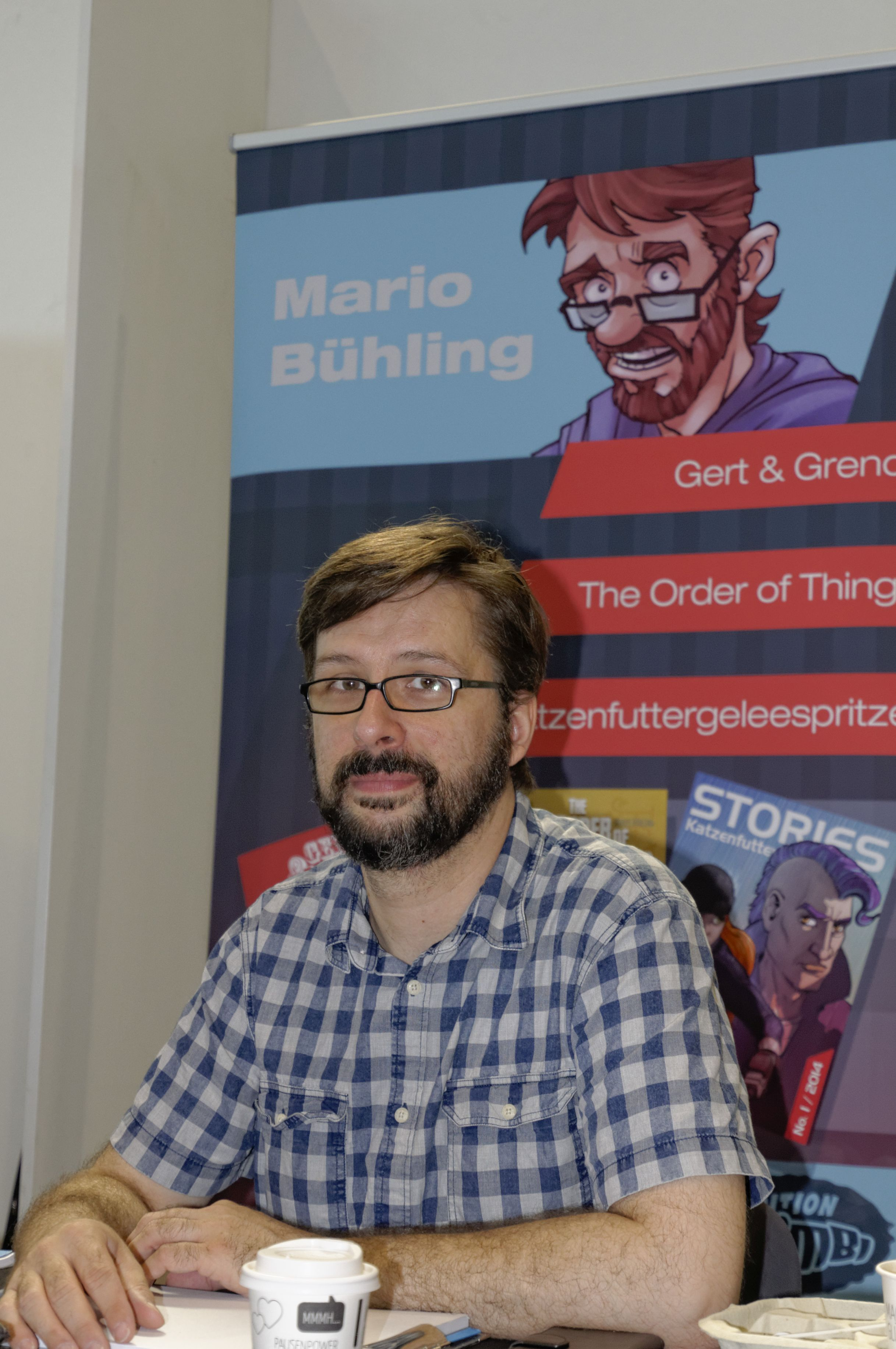 Bilder von der Comic Con Germany in Stuttgart 2018